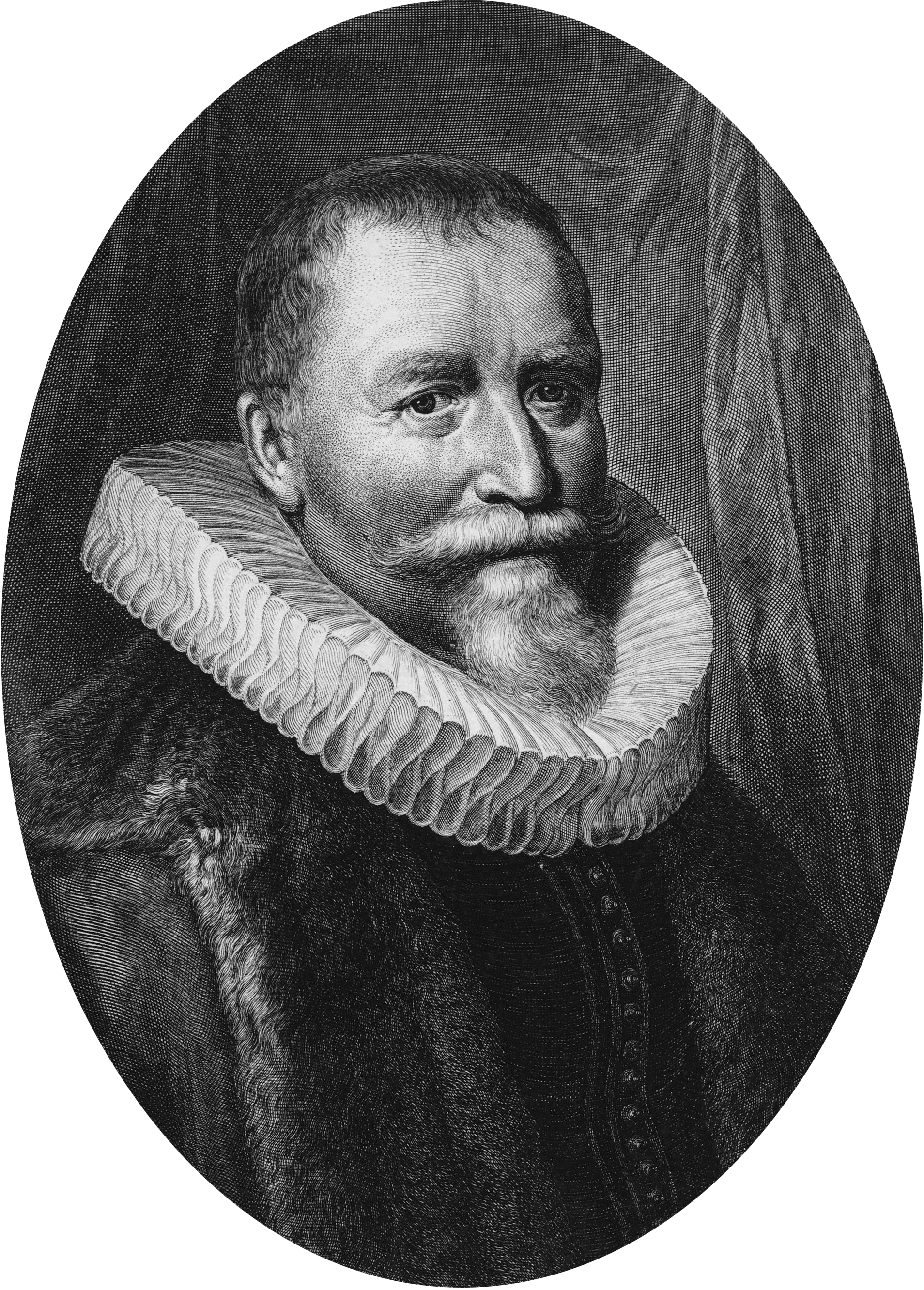 Reinier Pauw (29-07-1564 / 19-02-1636) Burgermeester van 1605 tot 1620 bewindhebber van de Oost Indische Compagnie.